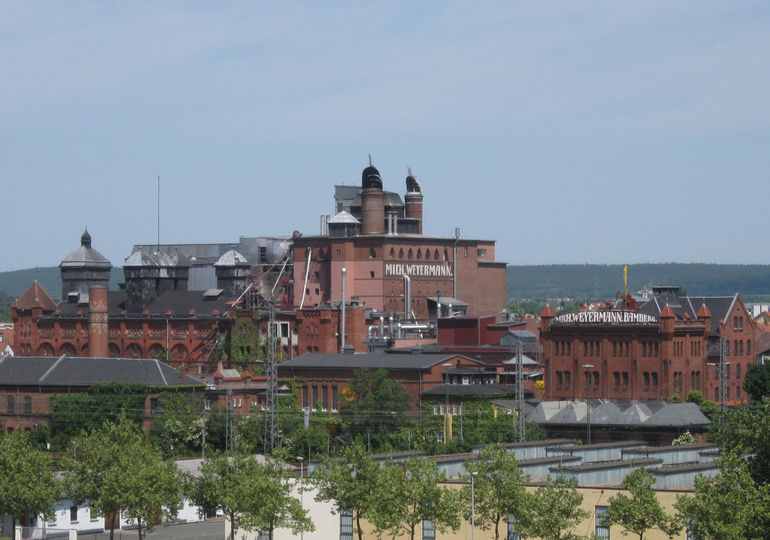 Teilansicht der Malzfabrik Weyermann in Bamberg